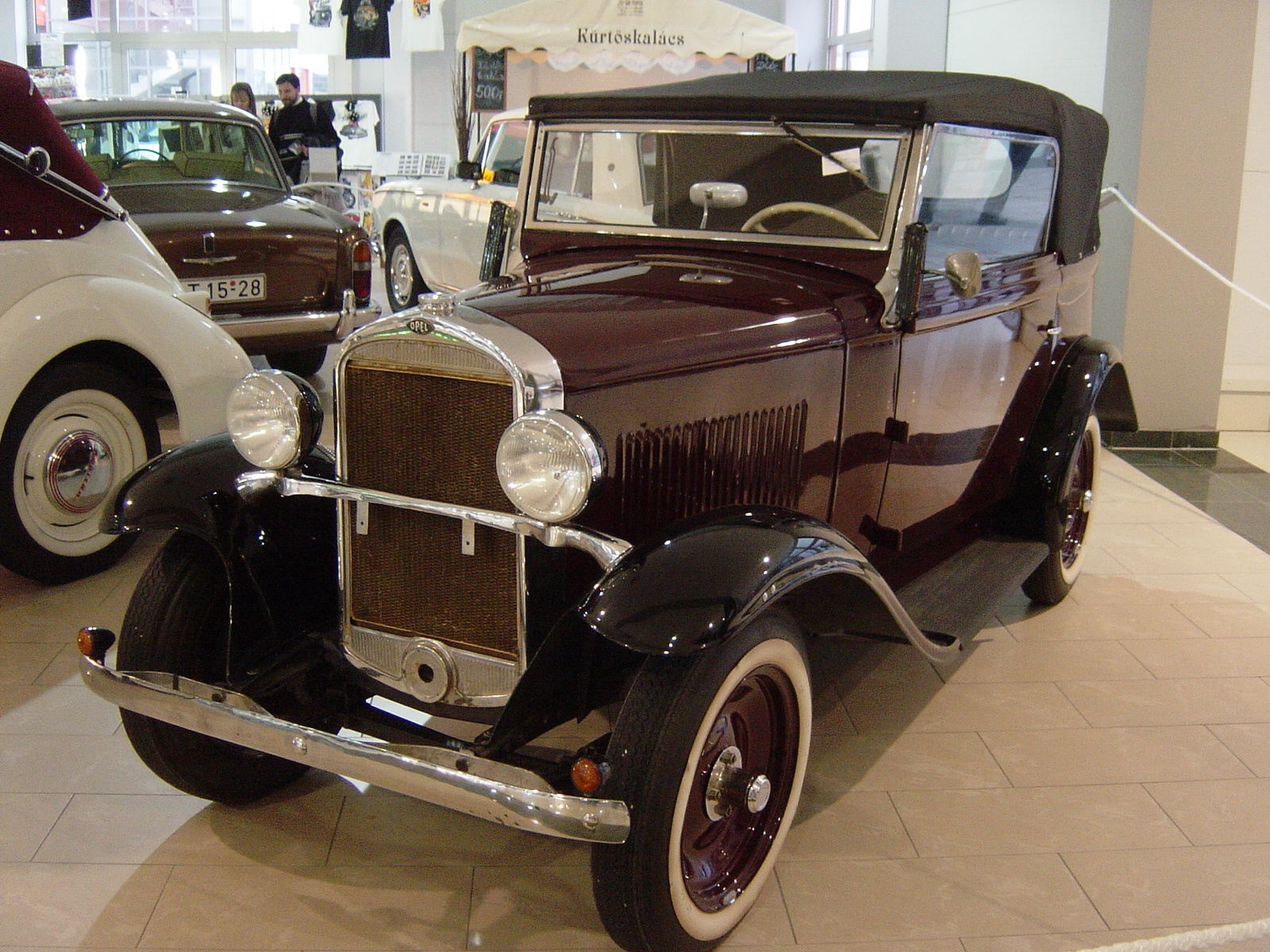 Opel 1.8 Liter Cabriolet, ca. 1931